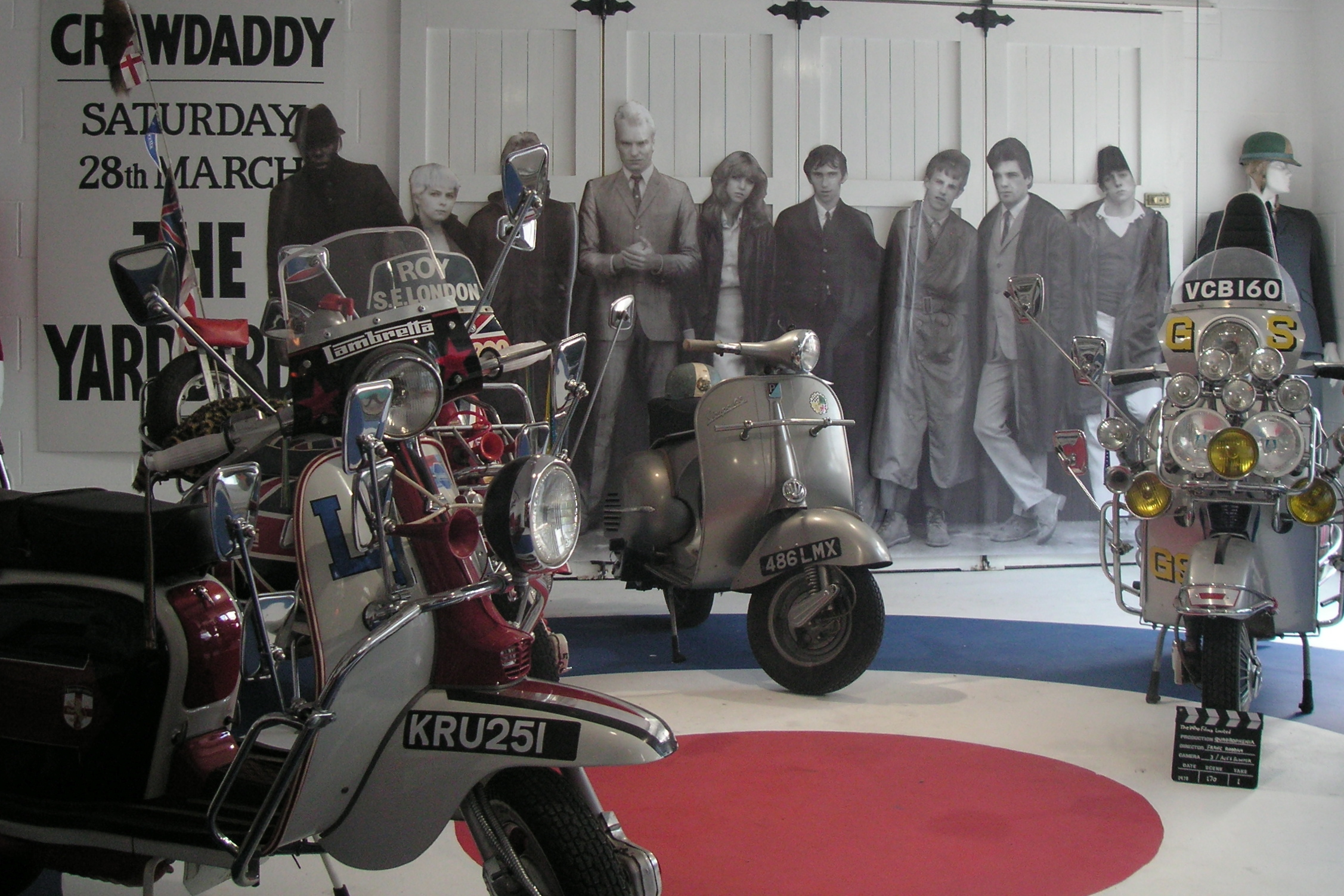 Quadrophenia exhibit Mods!